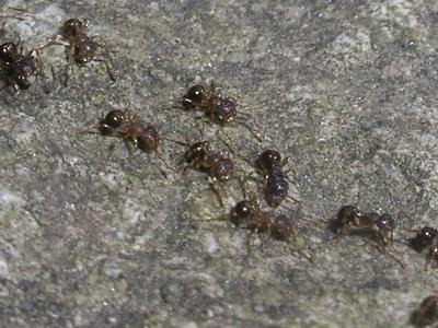 Pristomyrmex pungens (アミメアリ), Nagasaki(長崎県長崎市)